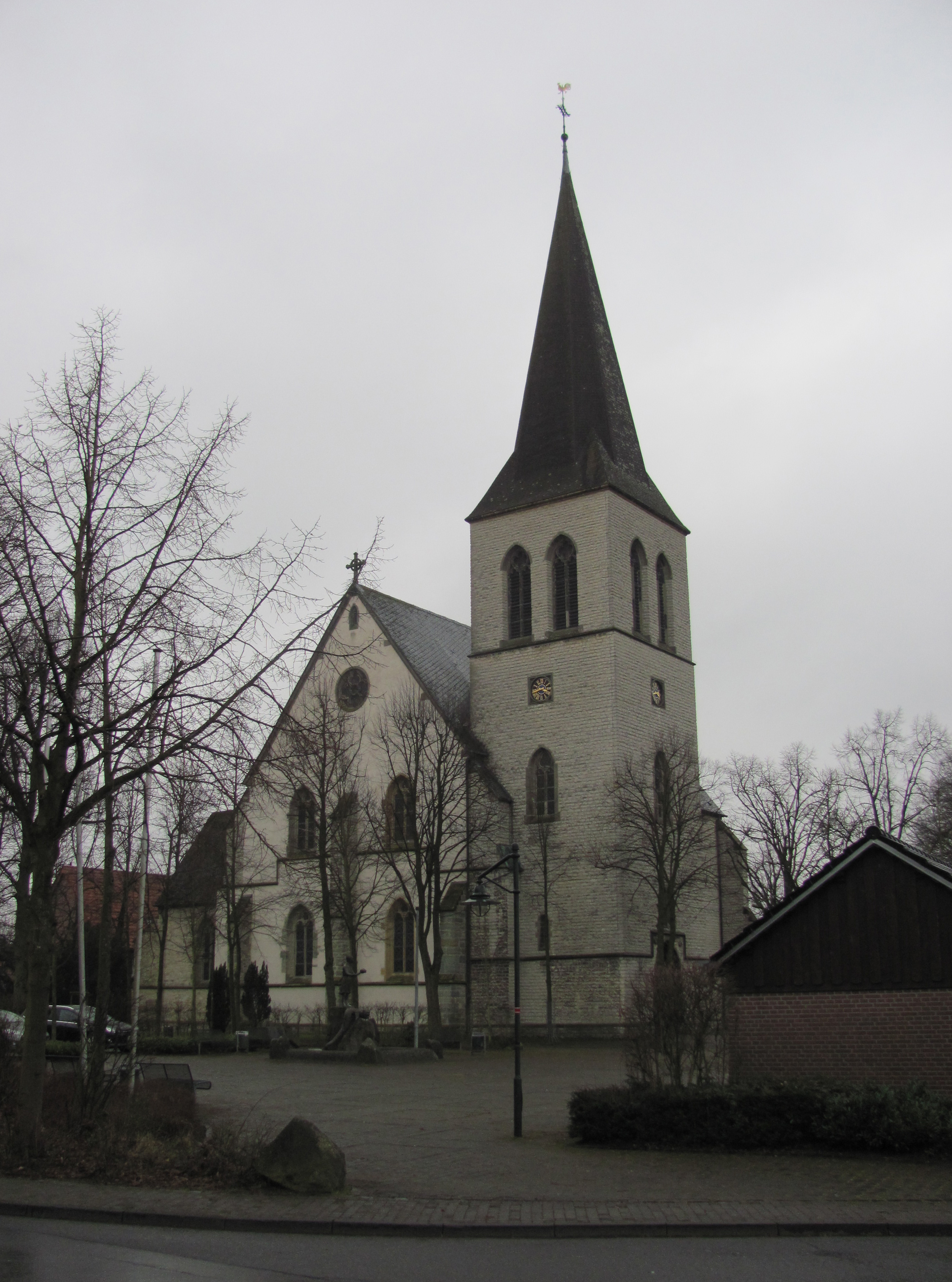 St. Lambertus in Dolberg (Stadt Ahlen), Ansicht von Nordwesten